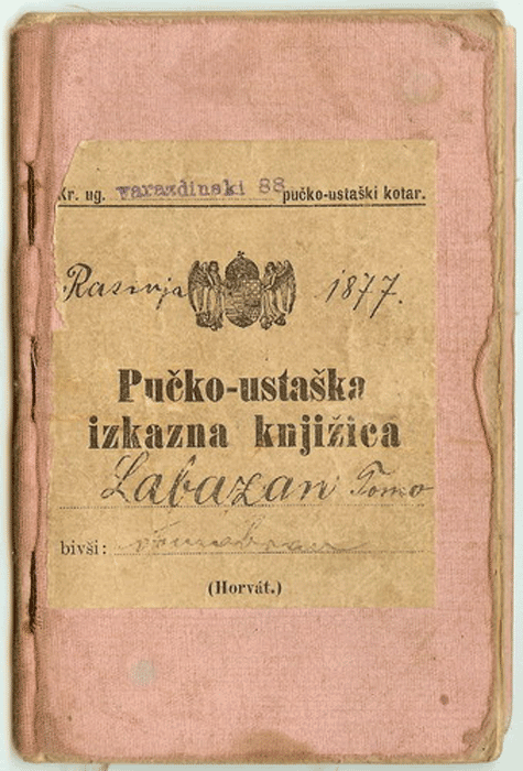 Pučko-ustaška iskazna knjižica hrvatskog domobrana